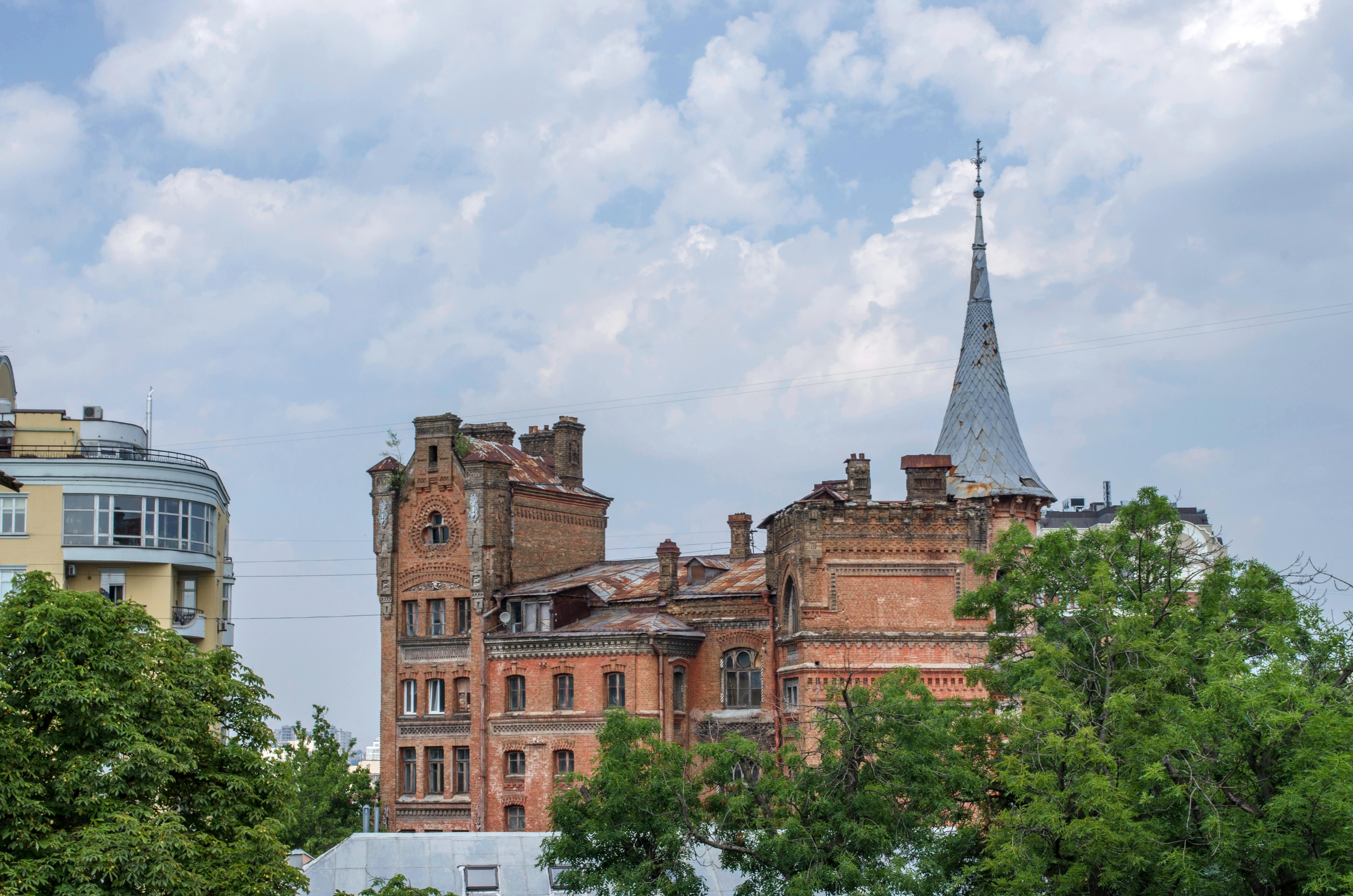 Будинок прибутковий, Київ, Ярославів Вал вул., 1